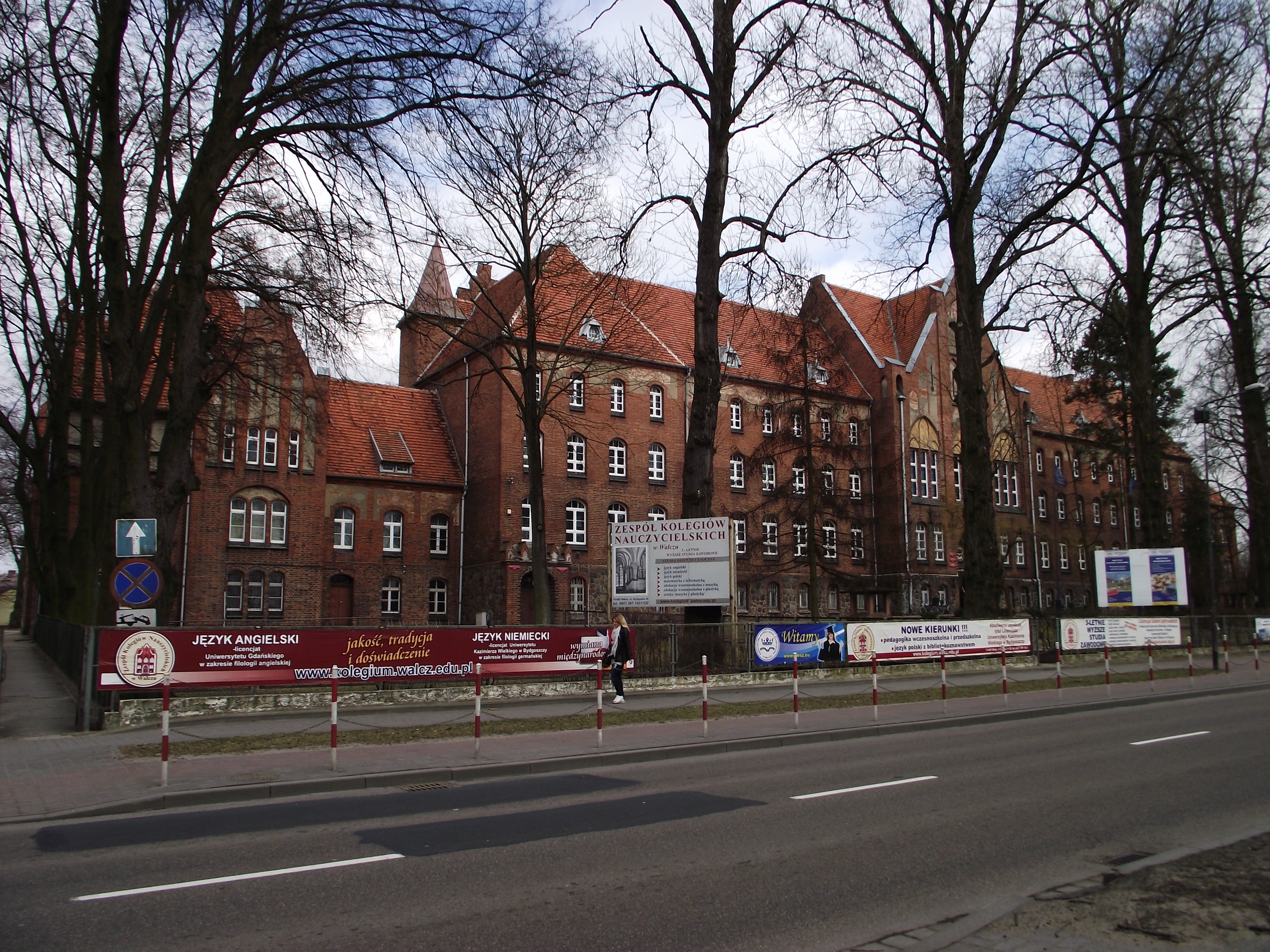 Wałcz, zespół seminarium nauczycielskiego, ob. LO i wyższa szkoła zawodowa, 1902-1905